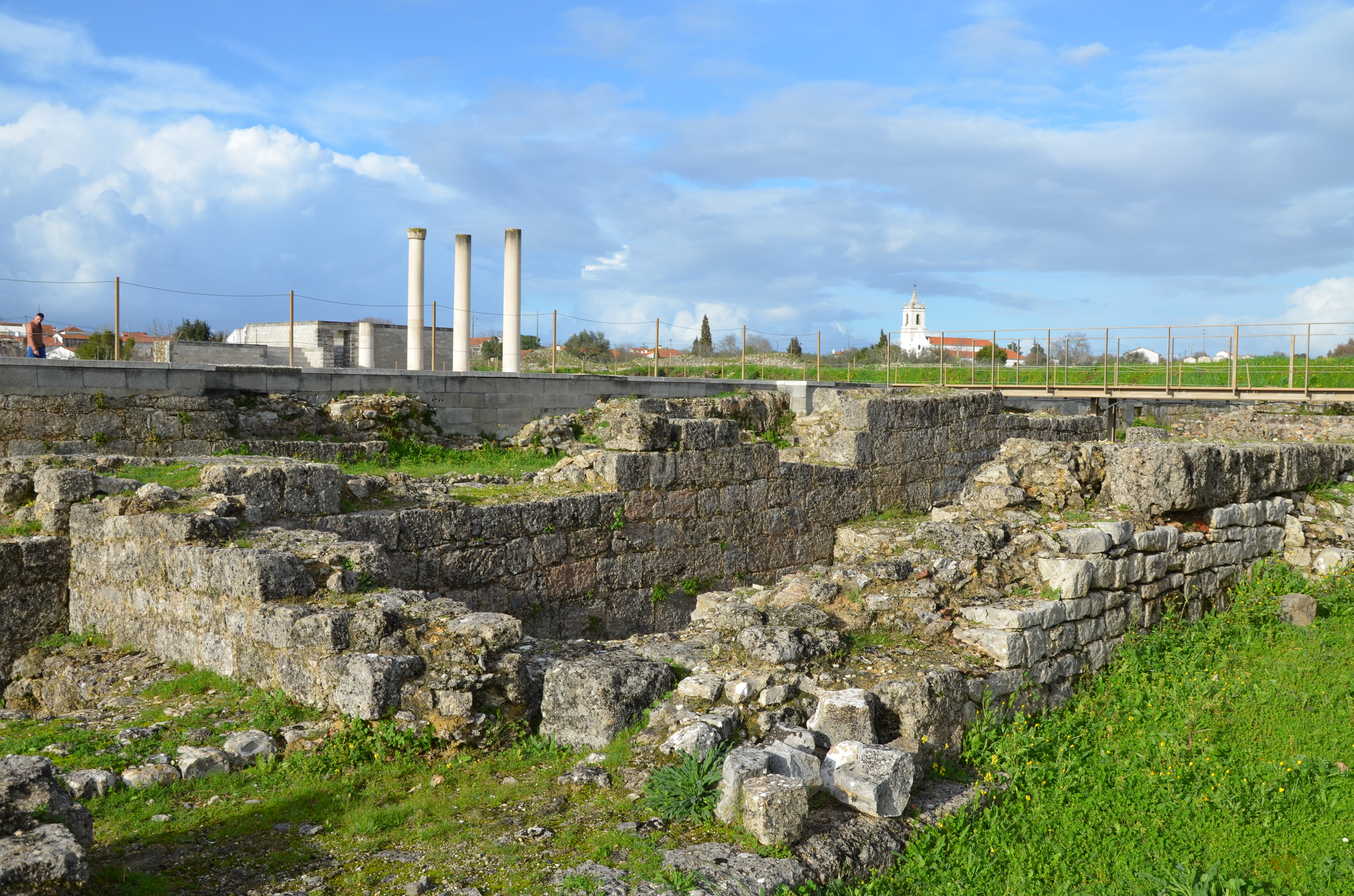 Conimbriga